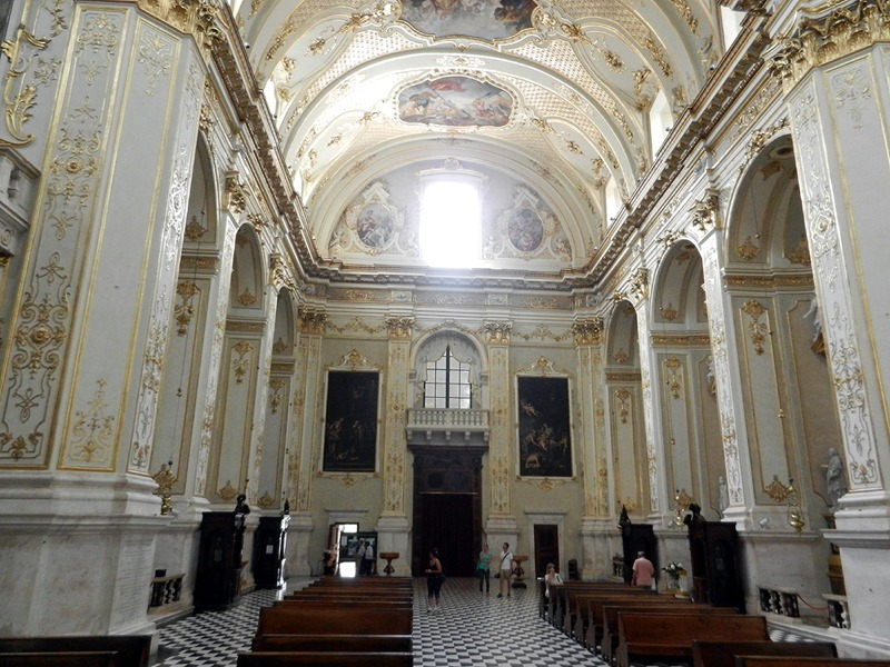 Bergamo - Interno del Duomo